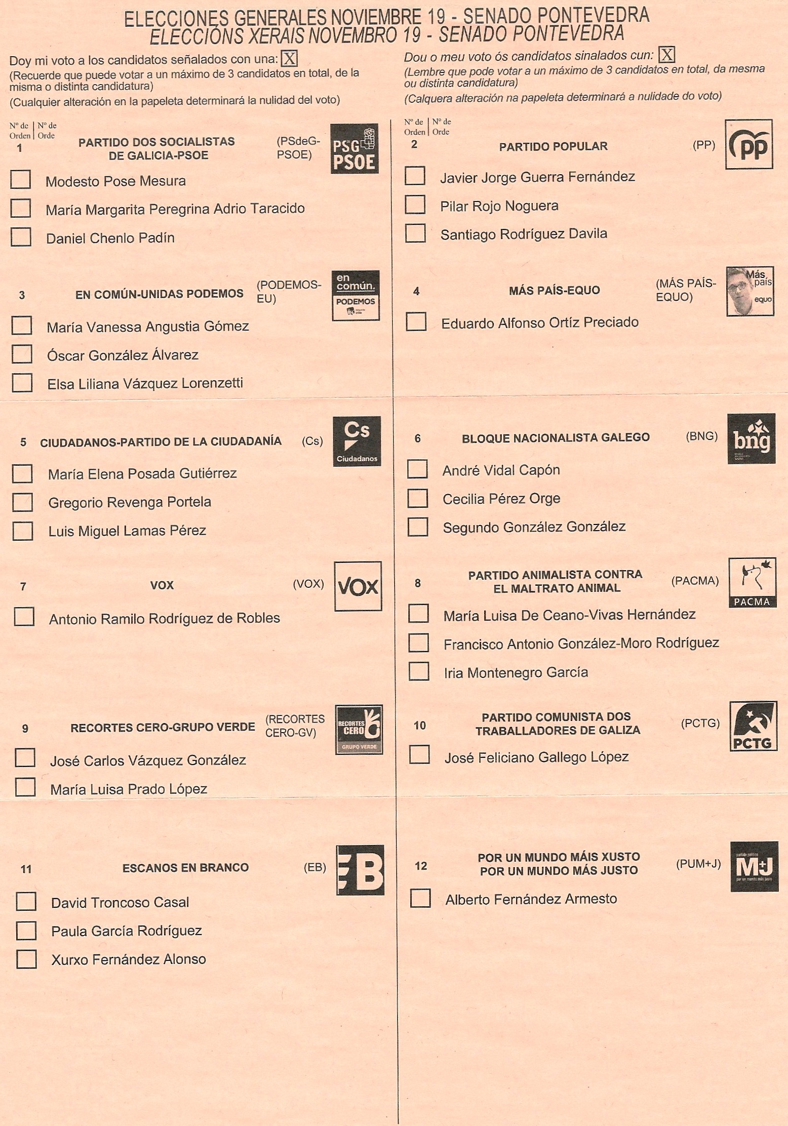 Papeleta para o Senado nas Eleccións xerais de novembro de 2019 da circunscrición electoral de Pontevedra.